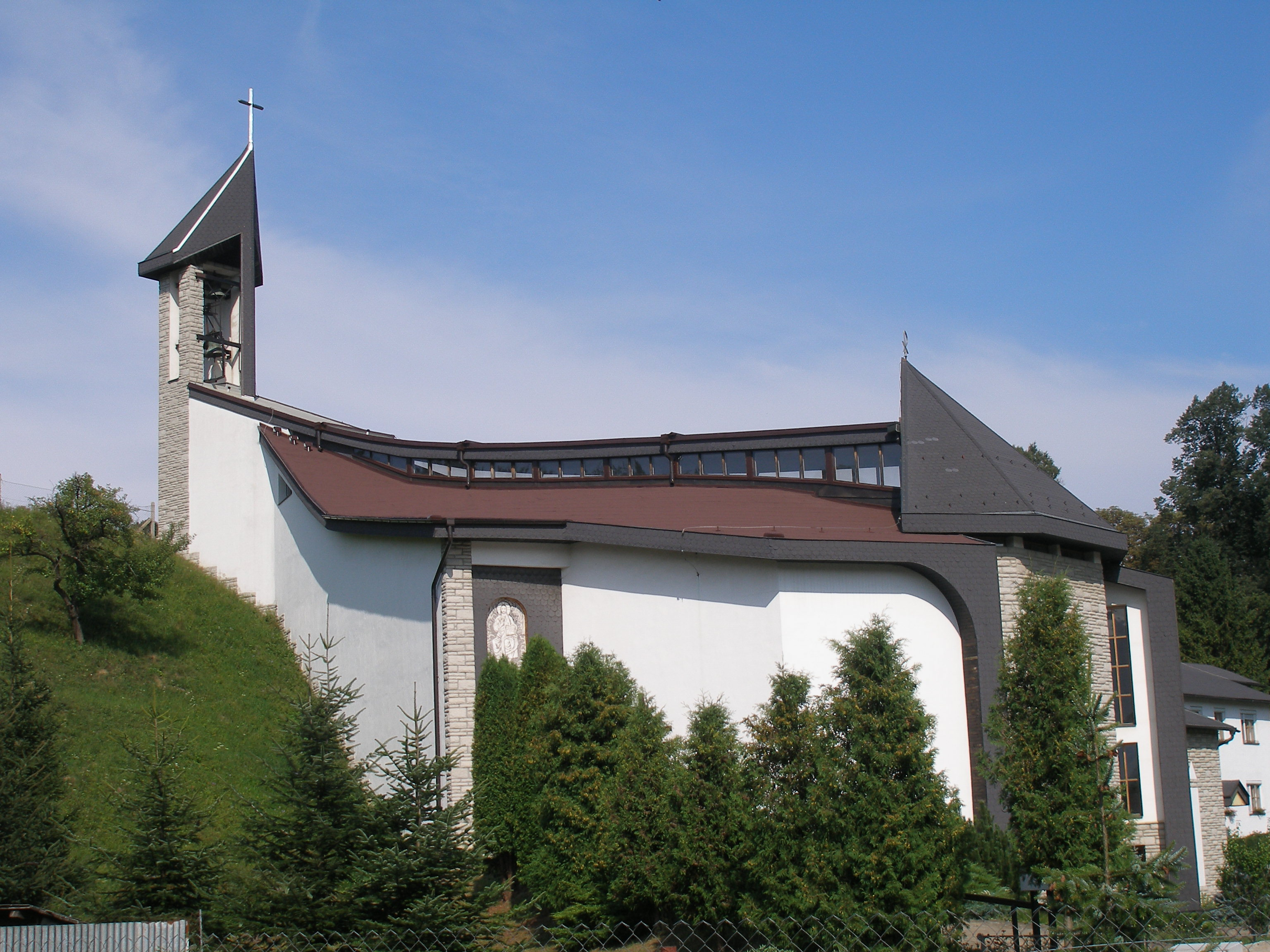 Obec Fričovce okr.Prešov, región Šariš